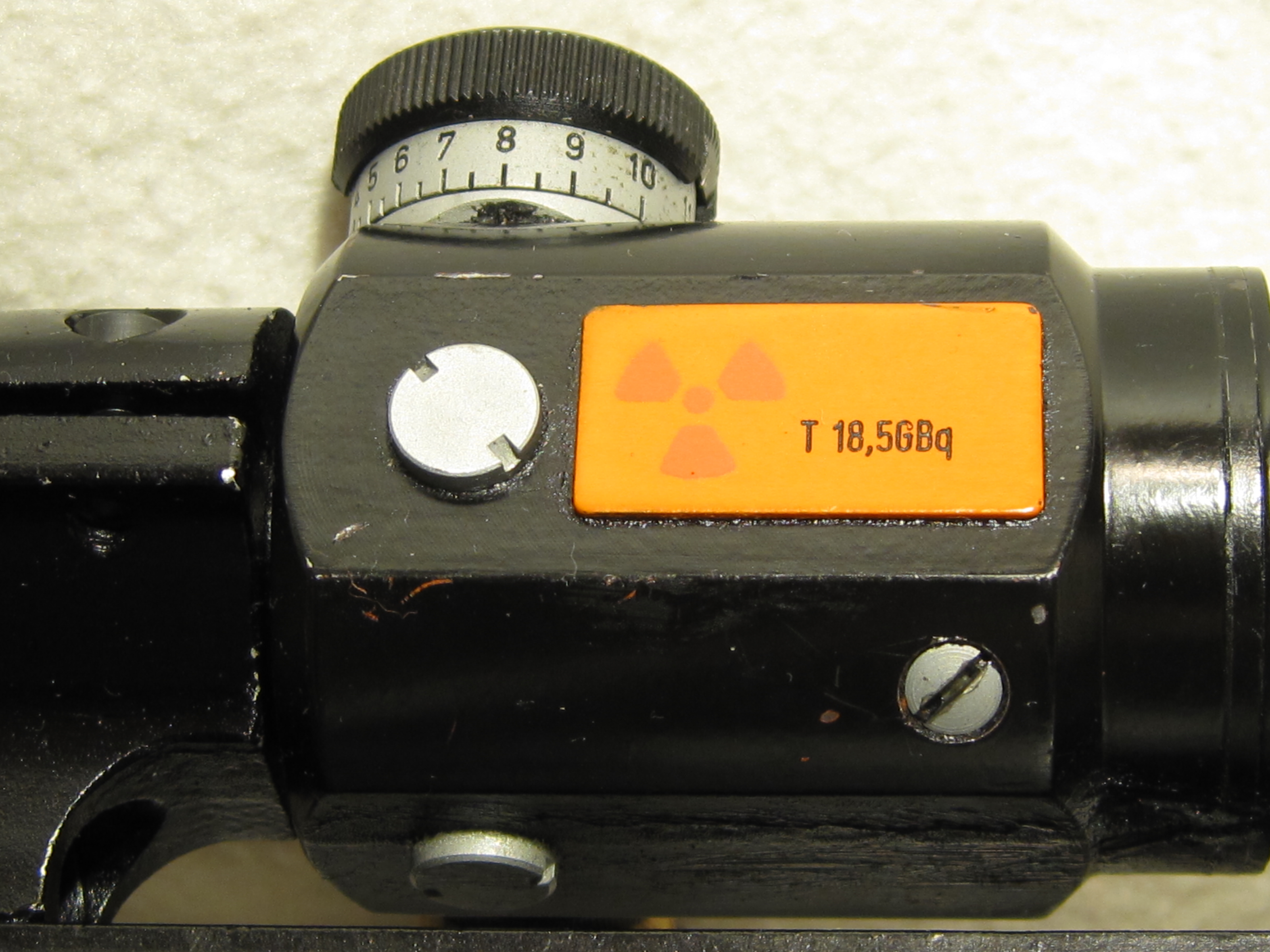 Zastava-M76-Muzzle_Baio